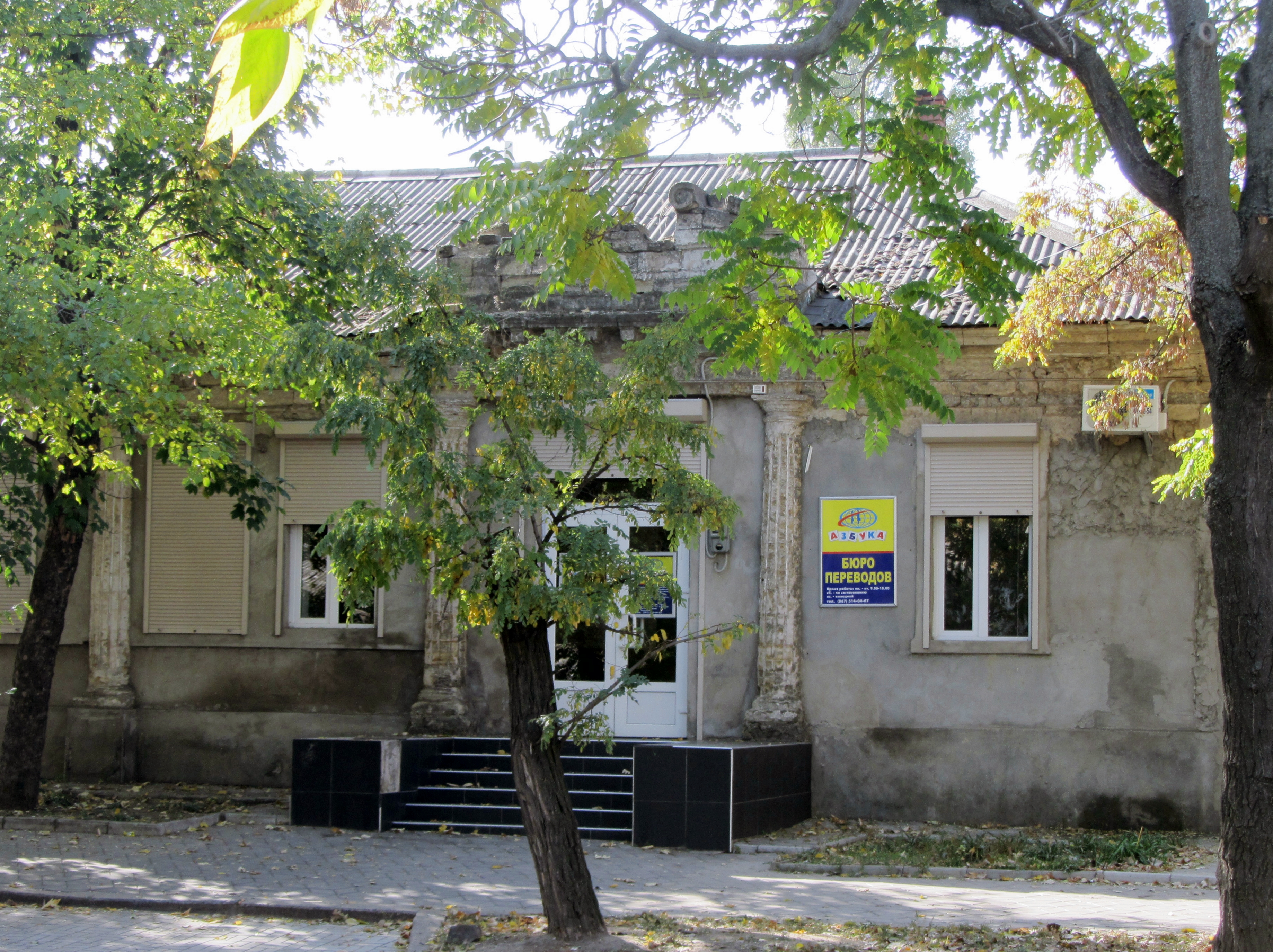 Будинок, в якому у 1879 – 1887 рр. мешкав Г.М. Ге, Миколаїв, вул. Наваринська, 25